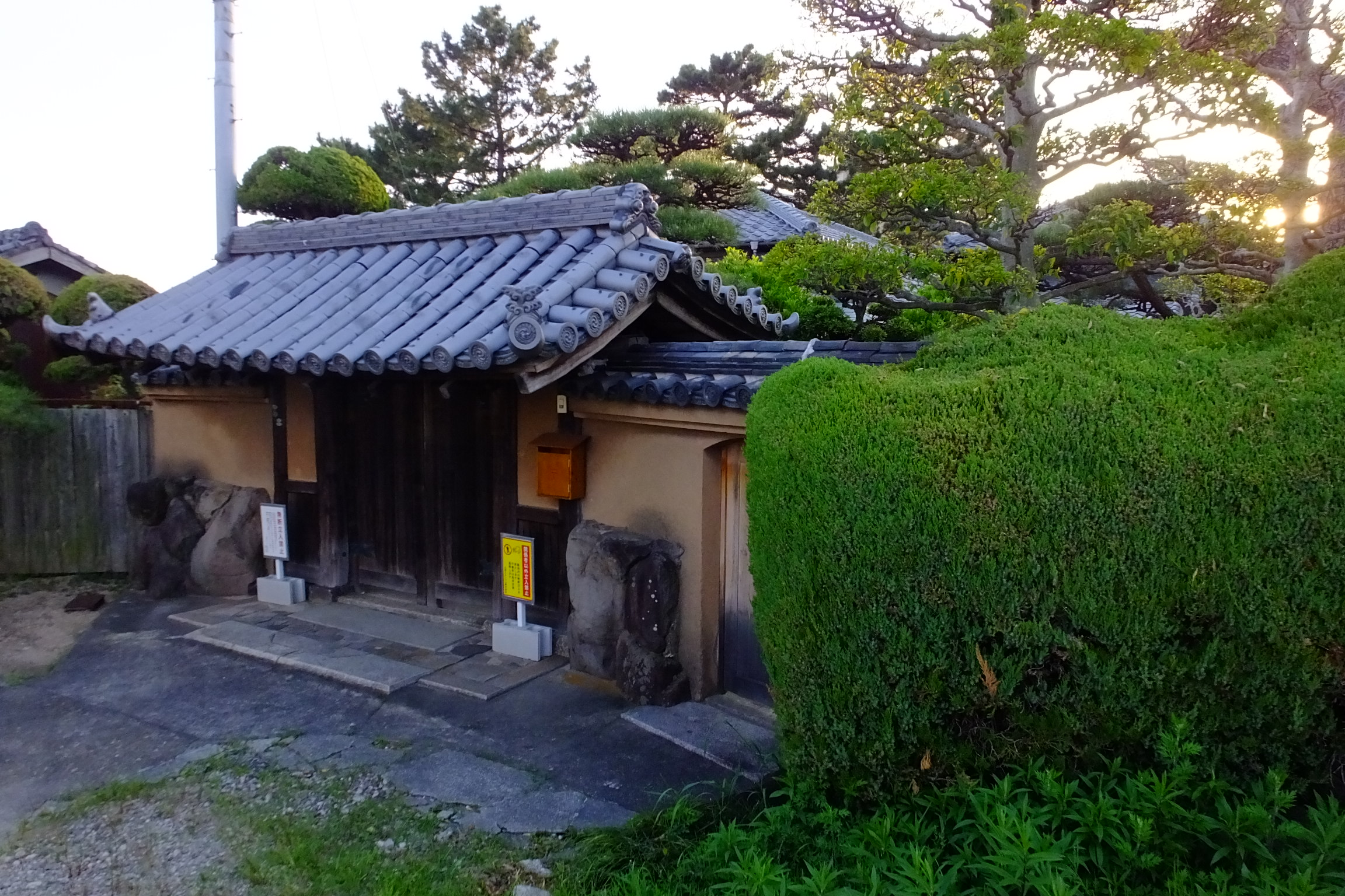 丸尾カルシウム 白沙荘（丸尾カルシウム社員寮）明石市 1915竣工 所在地 二見町東二見 指定年月平成11年３月26日 建築年代大正初期（20C前半） 指定理由 橋本関雪の別荘として、海の眺望を重視し、数寄屋風の要素や多様な様式を組合わせた近代和風建築の雰囲気を今に伝える貴重な遺構 主屋：木造平屋建、平入 屋根：寄棟桟瓦葺 付属屋：東門、蔵１棟、物置 塀・樹木：庭の中高木（マツ、ウメ等） 〒674-0092 兵庫県明石市二見町１４５４ MARUO CALCIUM CO., LTD.